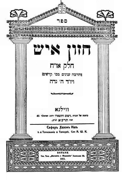 עמוד השער של ספר "חזון איש" במהדורתו הראשונה. וילנה תרע"א